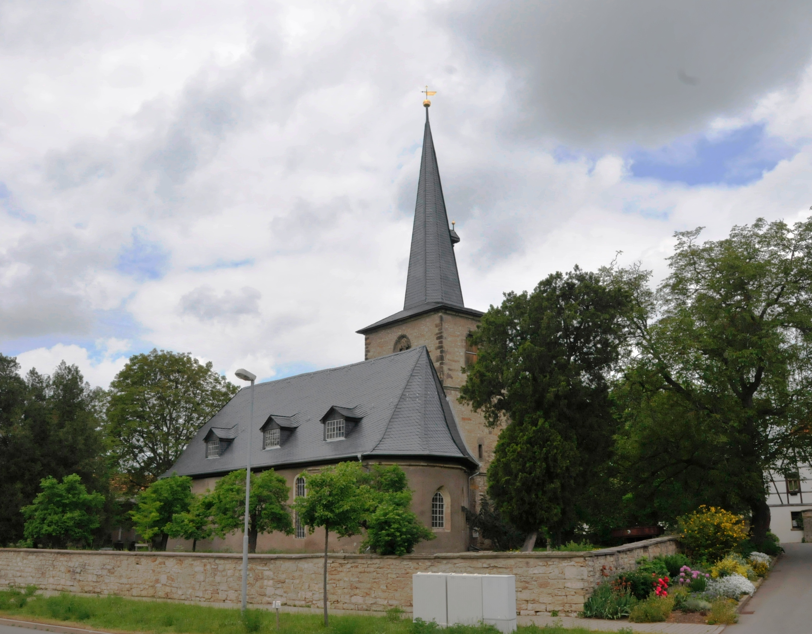 Ollendorf, Kirche The making of this document was supported by the Community-Budget of Wikimedia Germany.